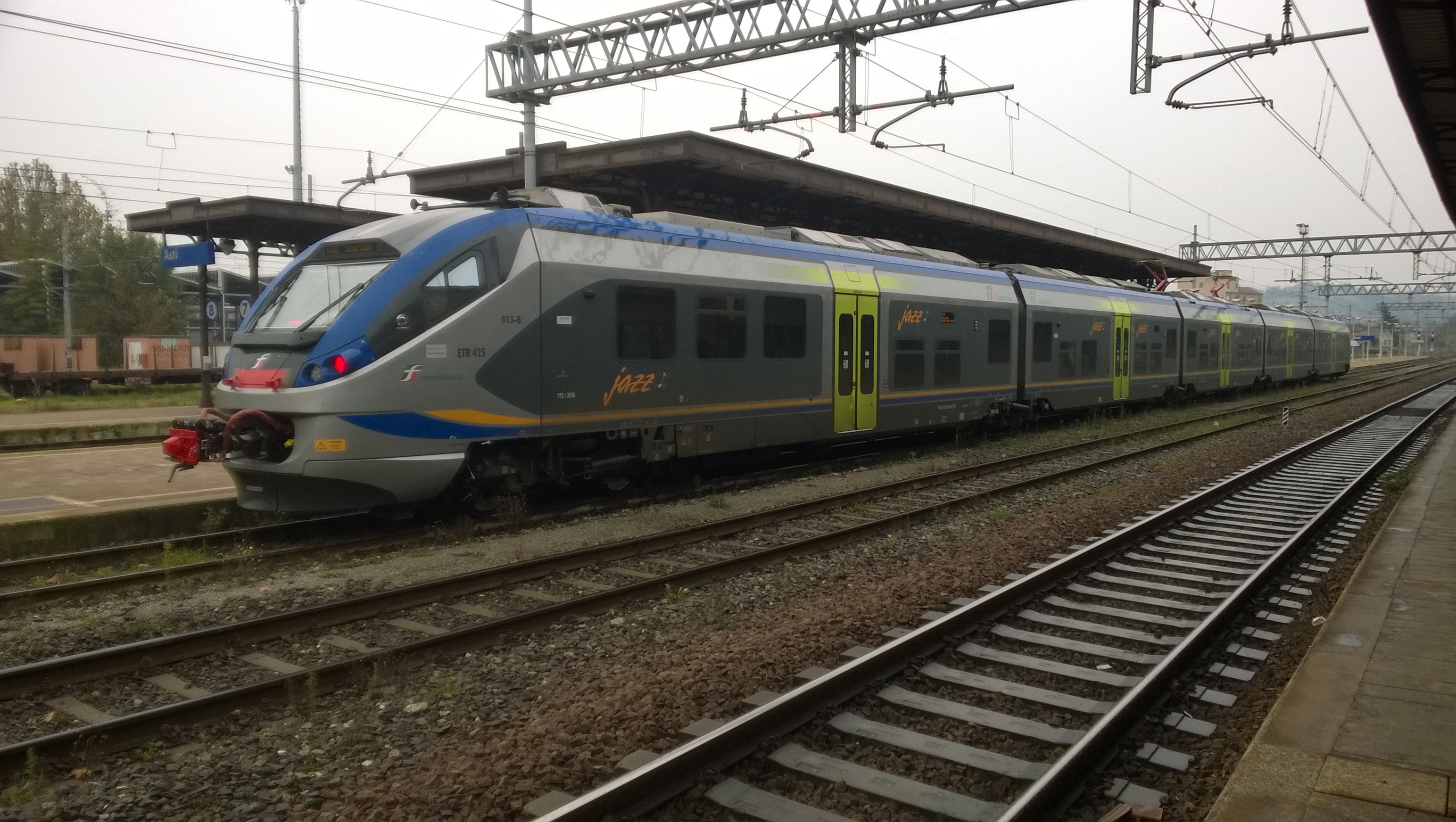 Treno Jazz (ETR.425) in sosta presso la stazione di Asti (AT), Italia.